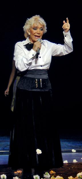 Greek singer Marinella in 2006